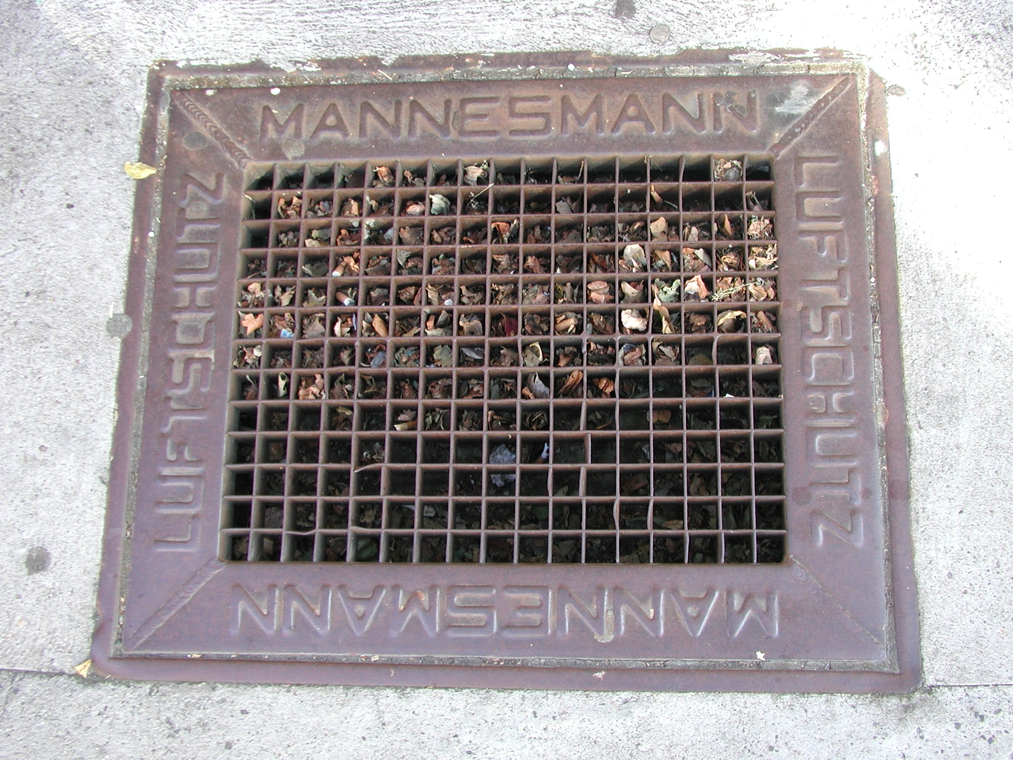 Eingang eines Luftschutzkellers in Kaiserslautern